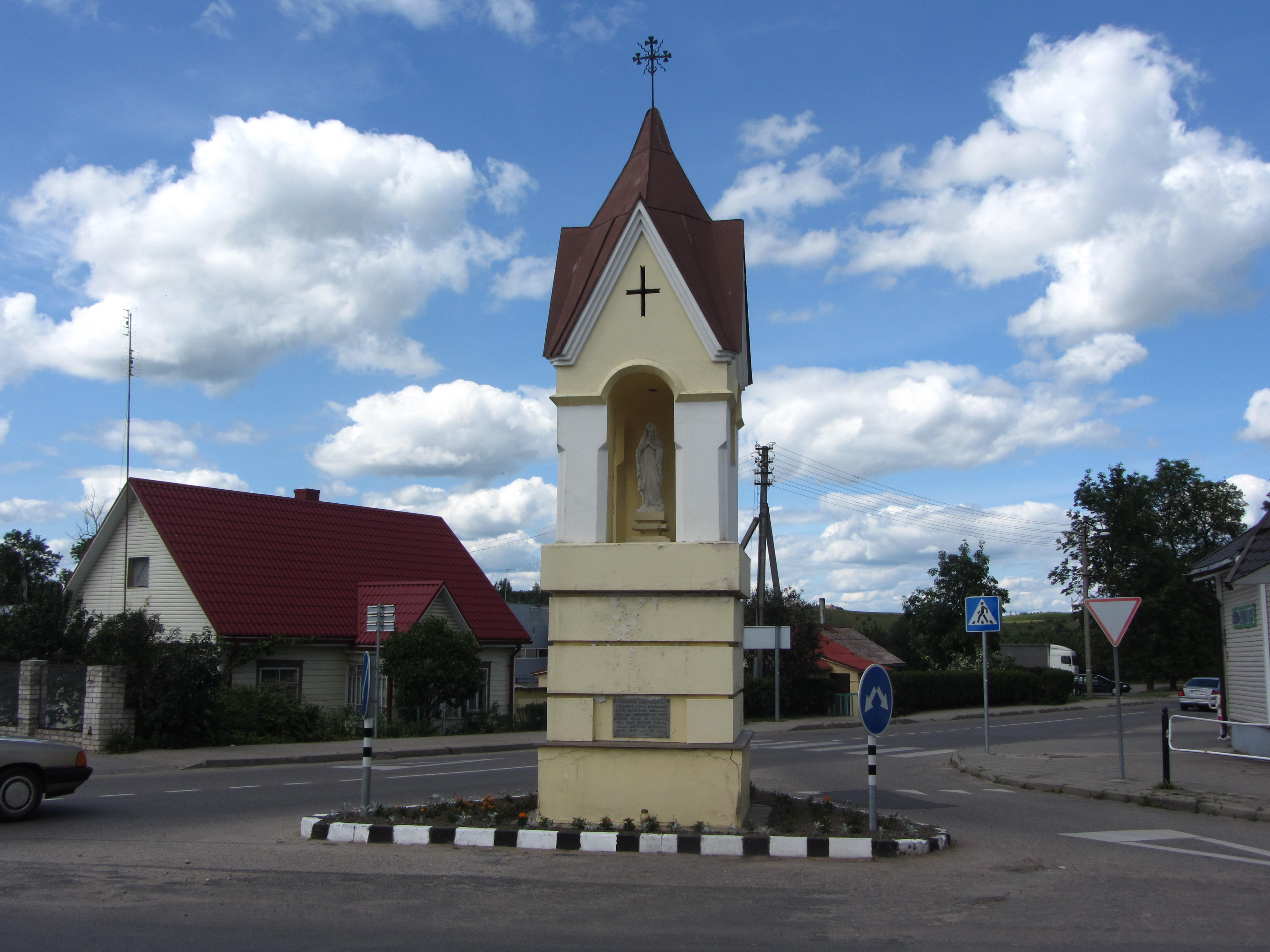 Švenčionys, Lithuania